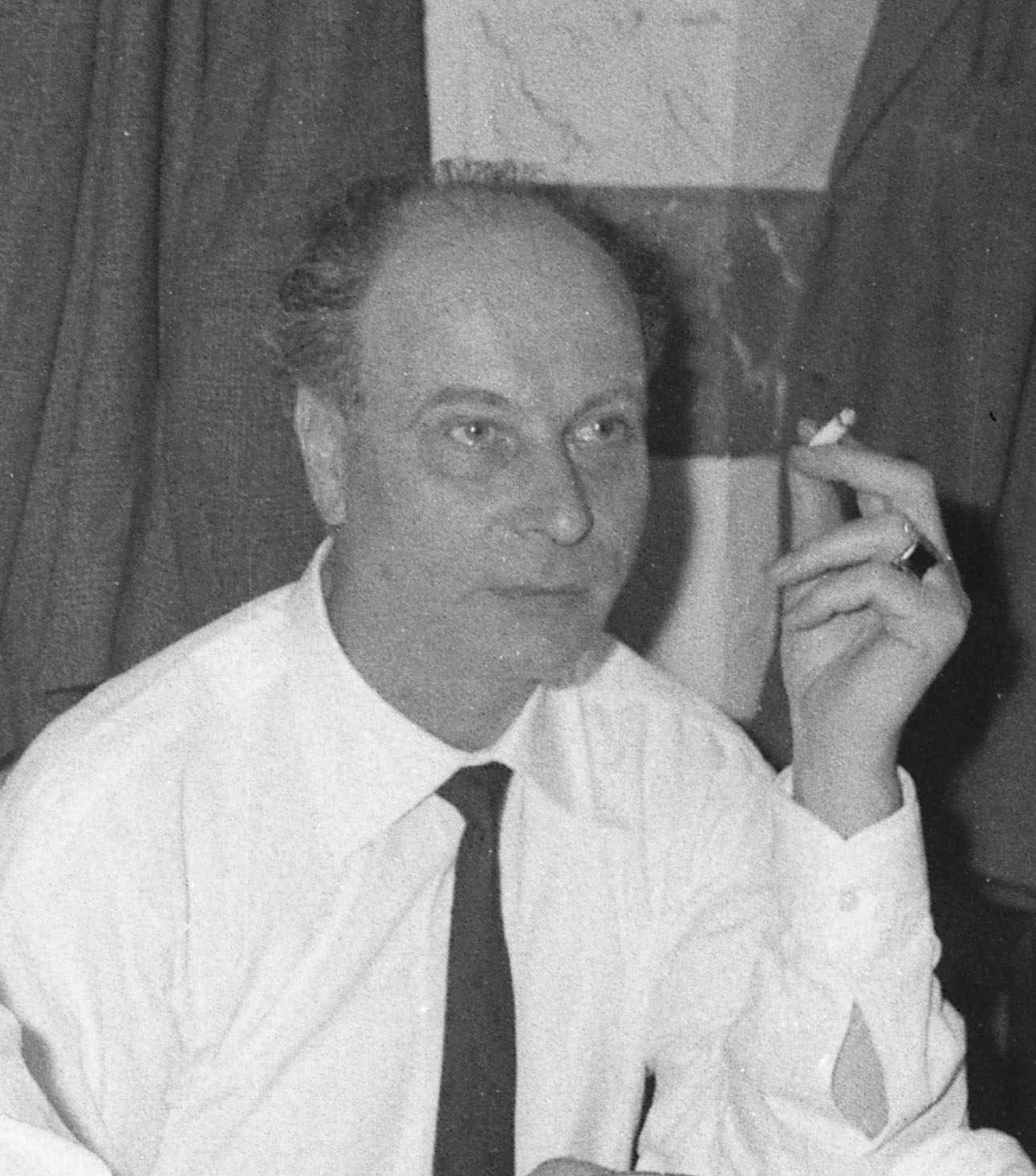 Giulio Torrini 1964